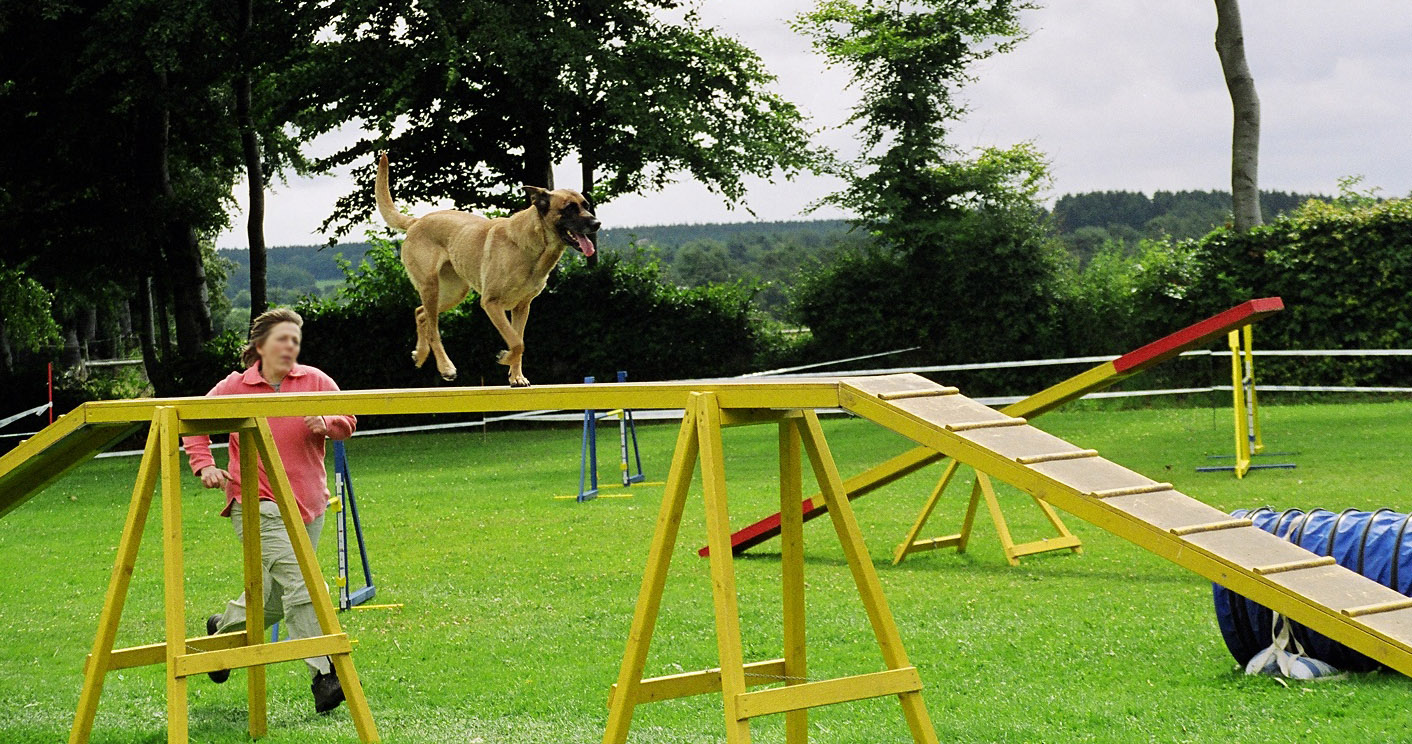 Agility Laufsteg